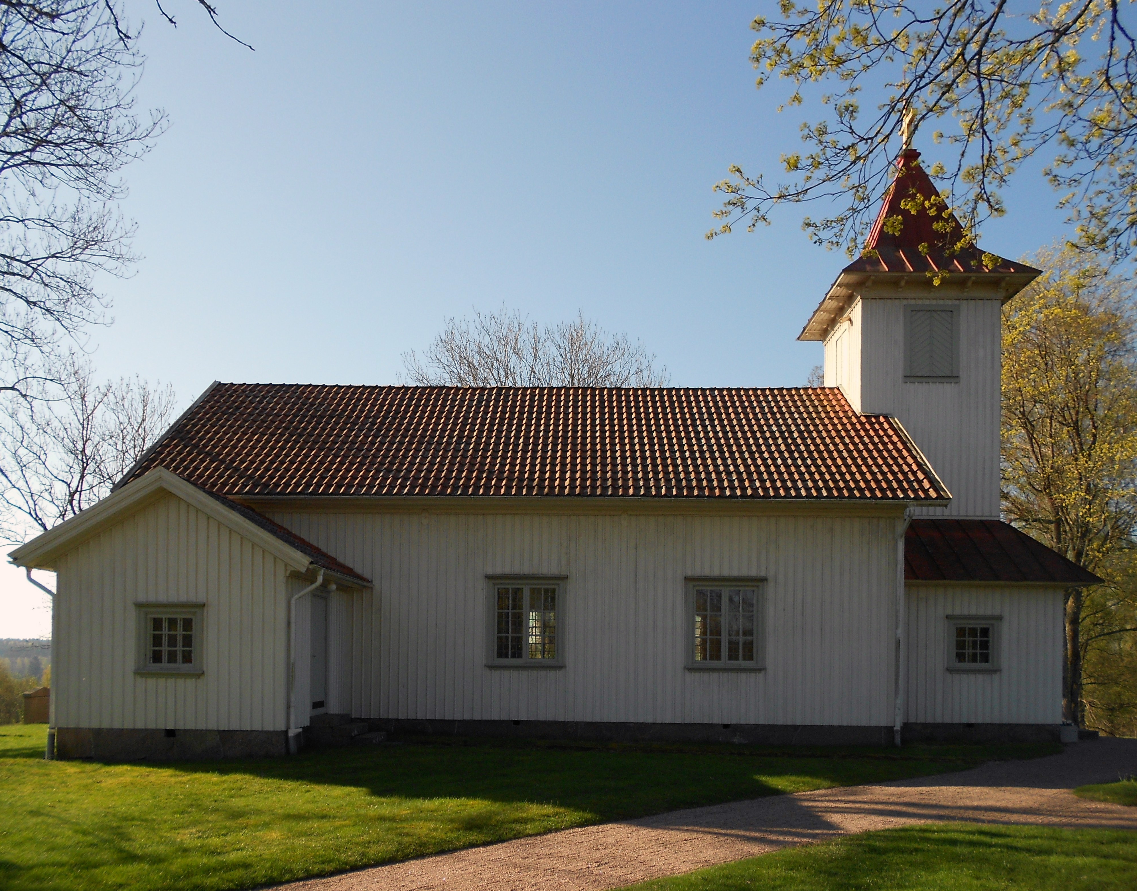 Bråttensby kyrka i Västergötland, Sverige